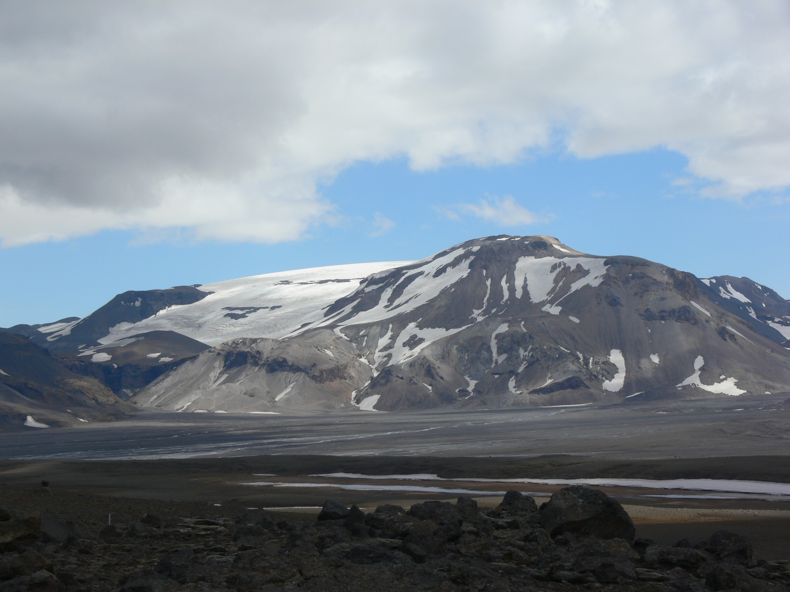 Geitlandsjökull, Teil des Langjökull in Island.